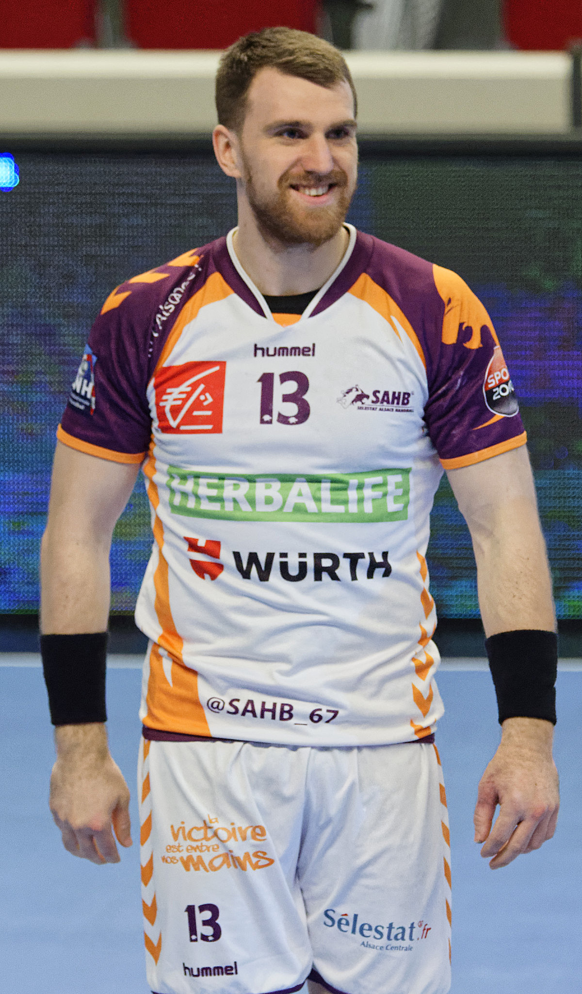 Rencontre de la 20e journée de LNh entre le PSG Handball et Sélestat. A Coubertin, le 08 avril 2015.